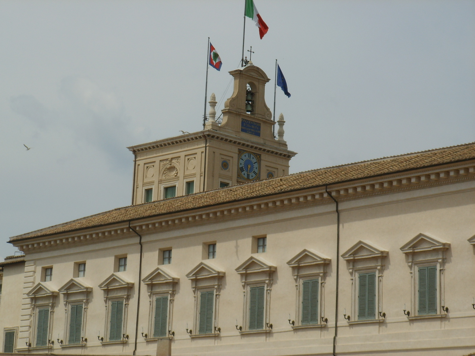 Quirinale Square, in Rome, Italy